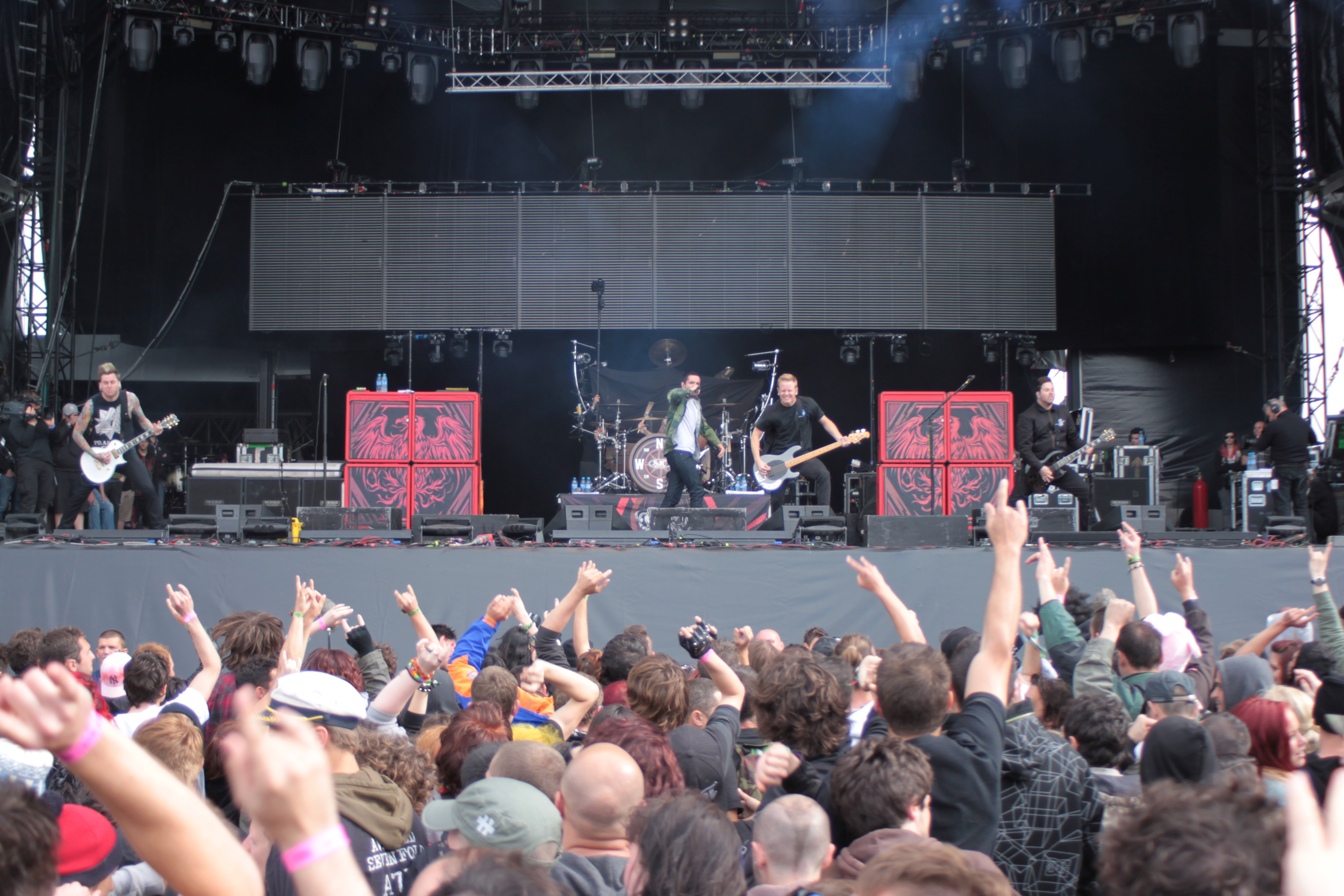 A Day to Remember, Helfest 2013, Fr-44-Clisson.